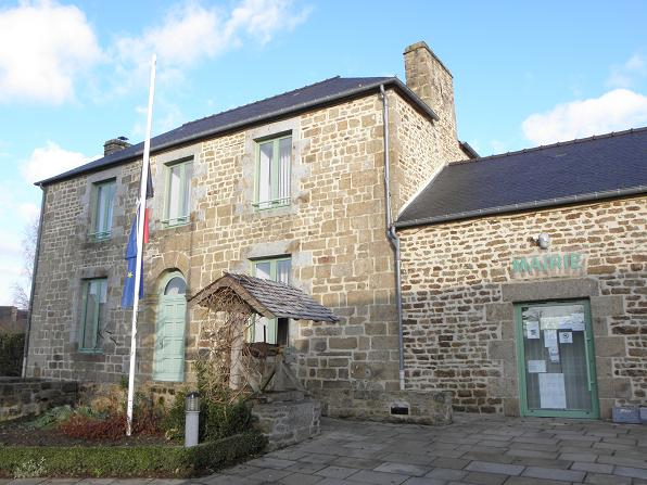 Mairie de Coglès (35).